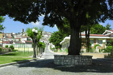 Santuario di Montefalcone di Val Fortore. Foto scattata da Lorix78, pubblico dominio.